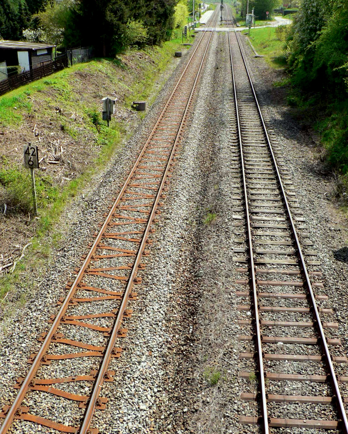 Y-Stahlschwellen und Stahlschwellen in normaler Bauform im Gleisbett, gesehen in Balingen